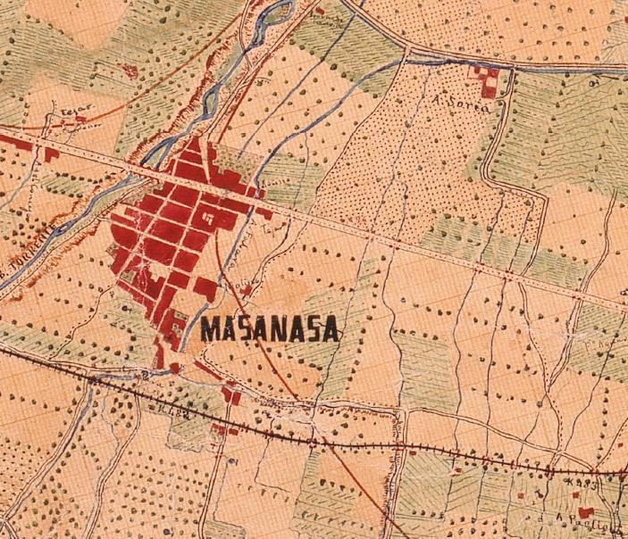 Massanassa el 1883 (el nord està a la dreta).